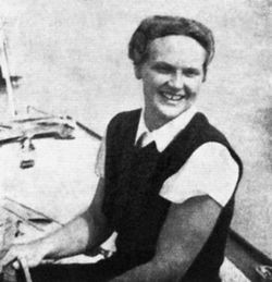 Gordon Ewelin (1909. május 24 – Buenos Aires, 1993) győzött a Tranmontána nevű hajójával (anyakikötője Balatonföldvár) a Kékszalag vitorlásversenyen 1940-ben és 1942-ben. A Tramontana 1926-ban került édesapja, Gordon Róbert tulajdonába, és Balatonföldvár volt az anyakikötője. Gordon Róbert miniszteri tanácsos, a Duna-Száva-Adria vasút vezérigazgatója, a Királyi Magyar Yacht Club vicecommodoréja, azaz elnökhelyettese volt. Evelyn sokat versenyzett a hajón, majd később, édesapja 1929-es halála után kormányozta is. Amikor a Tramontánával a Kékszalag-sikereket aratta, akkor már dr. Kultsár István miniszteri tanácsos, a KMYC contrecommodoréjának a felesége volt.